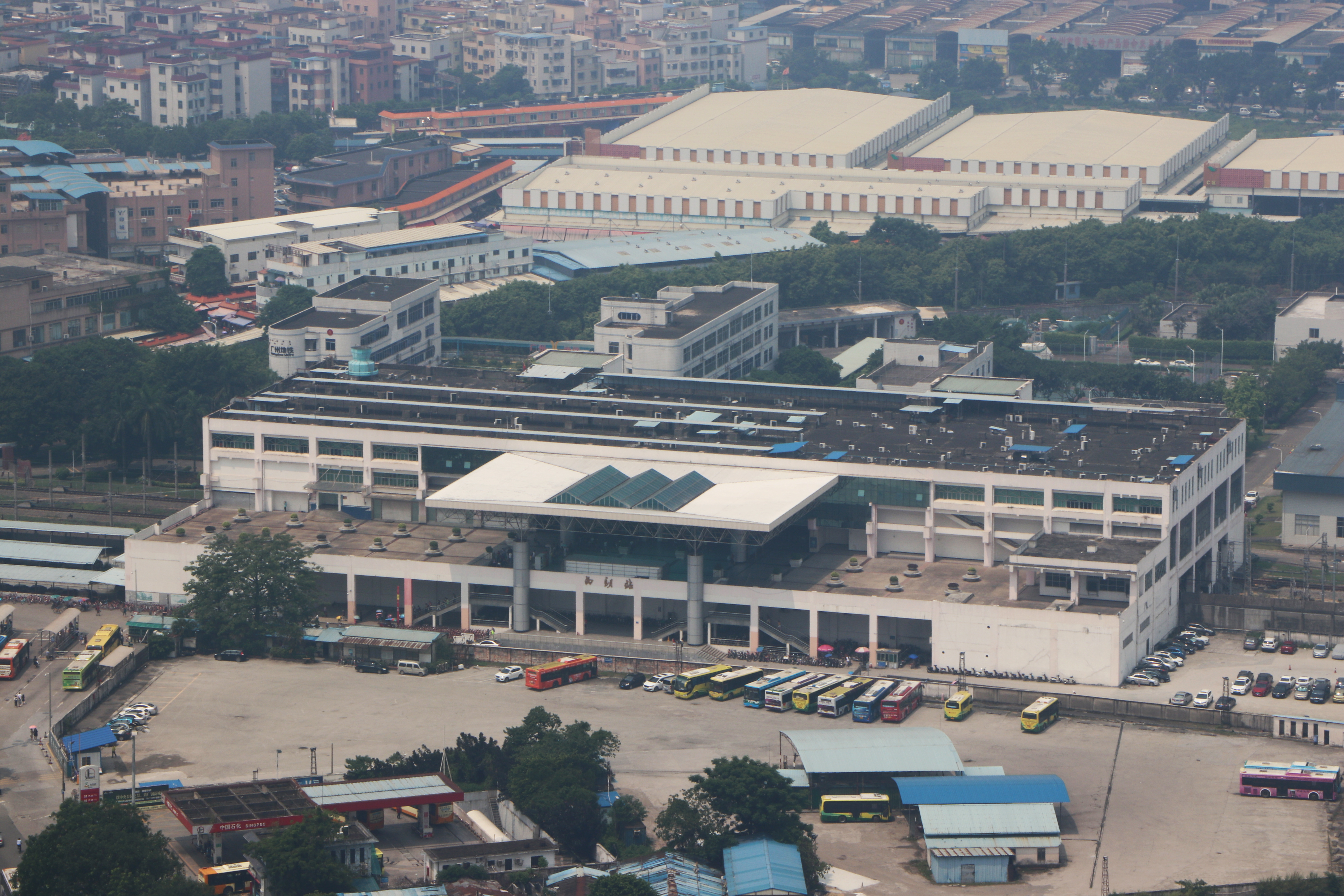 广州地铁西朗站